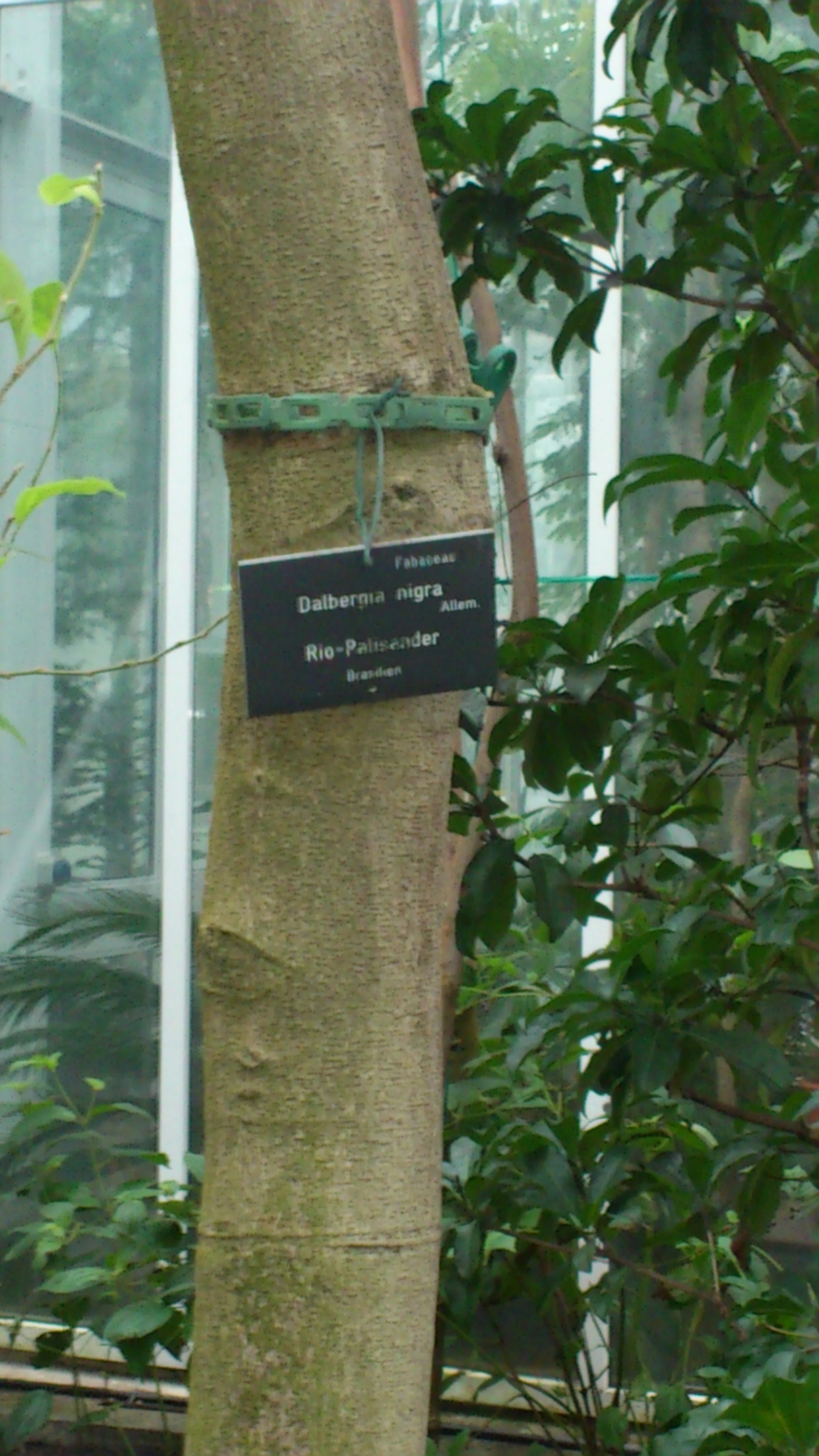 Das Bild zeigt die Borke von Dalbergia nigra.